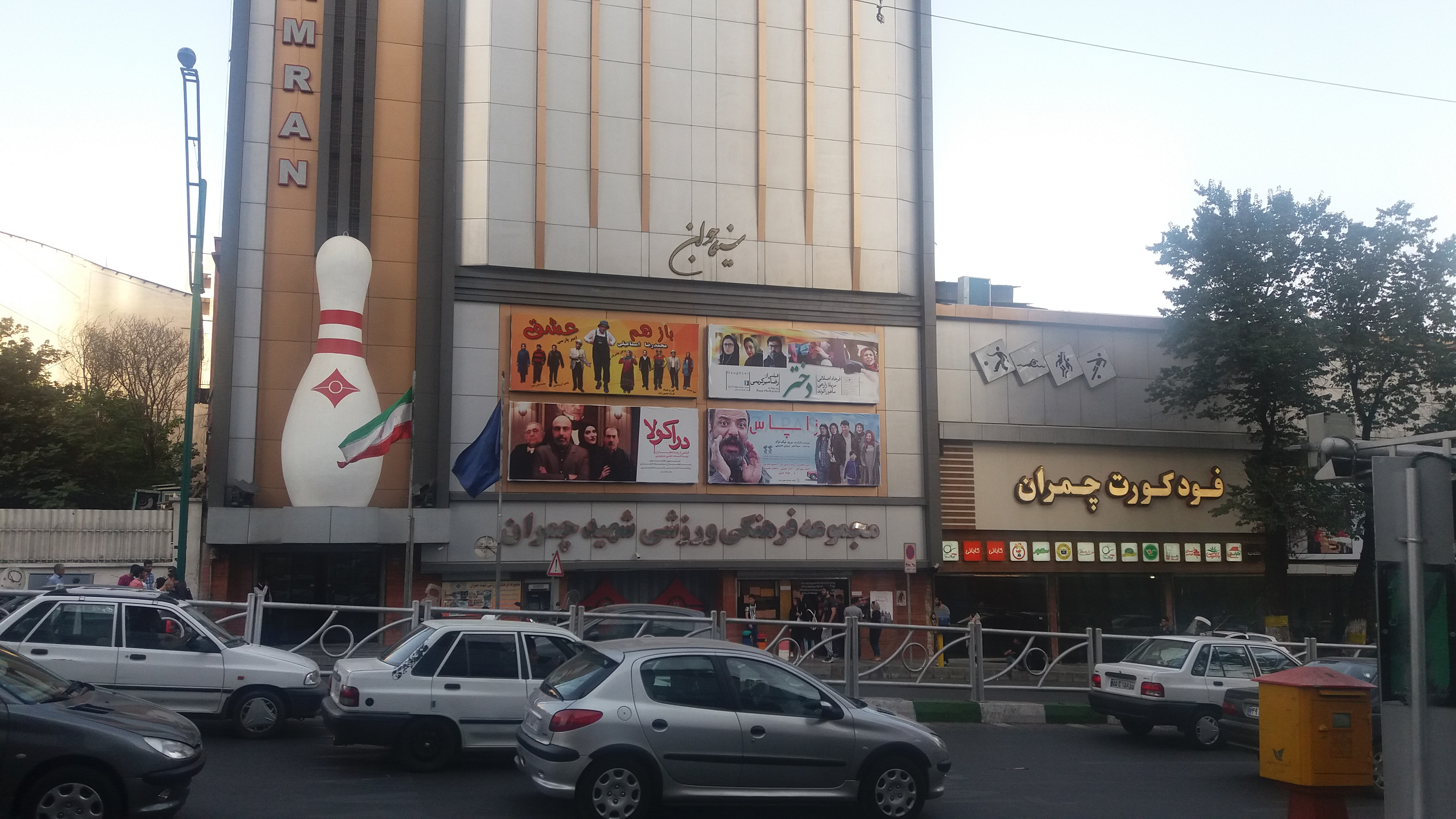 سینما جوان - ۱۳۹۵